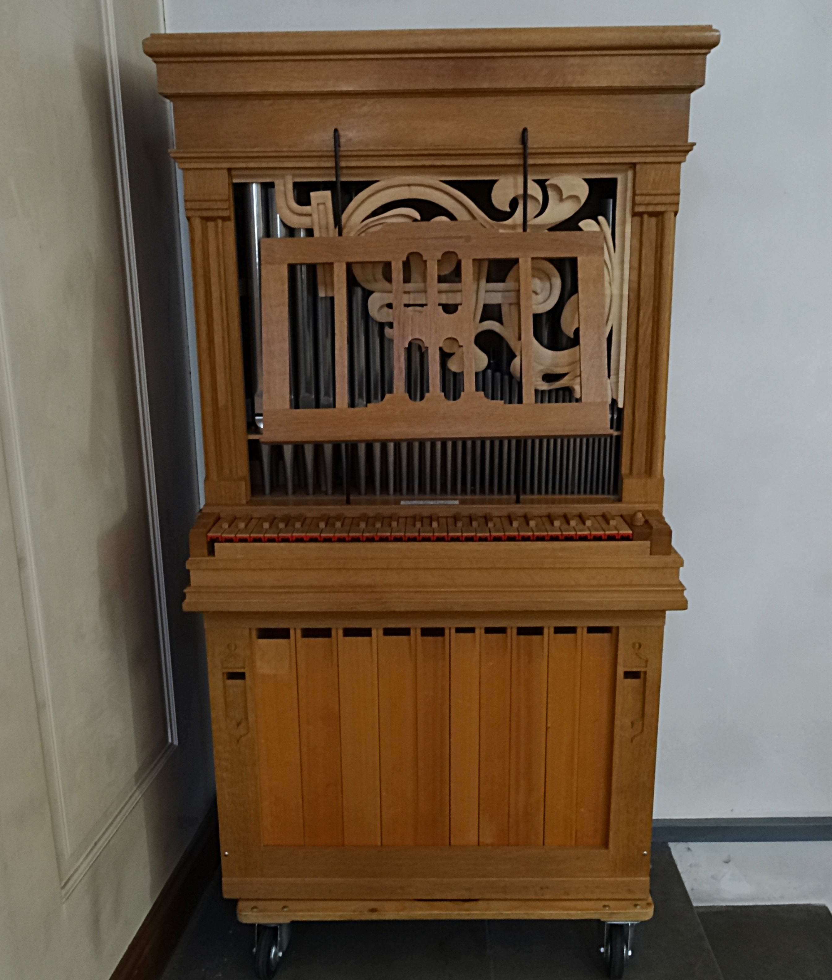 Barock-Truhenorgel von Gerrit Cornelis Klop (2010) in der Predigerkirche in Zürich